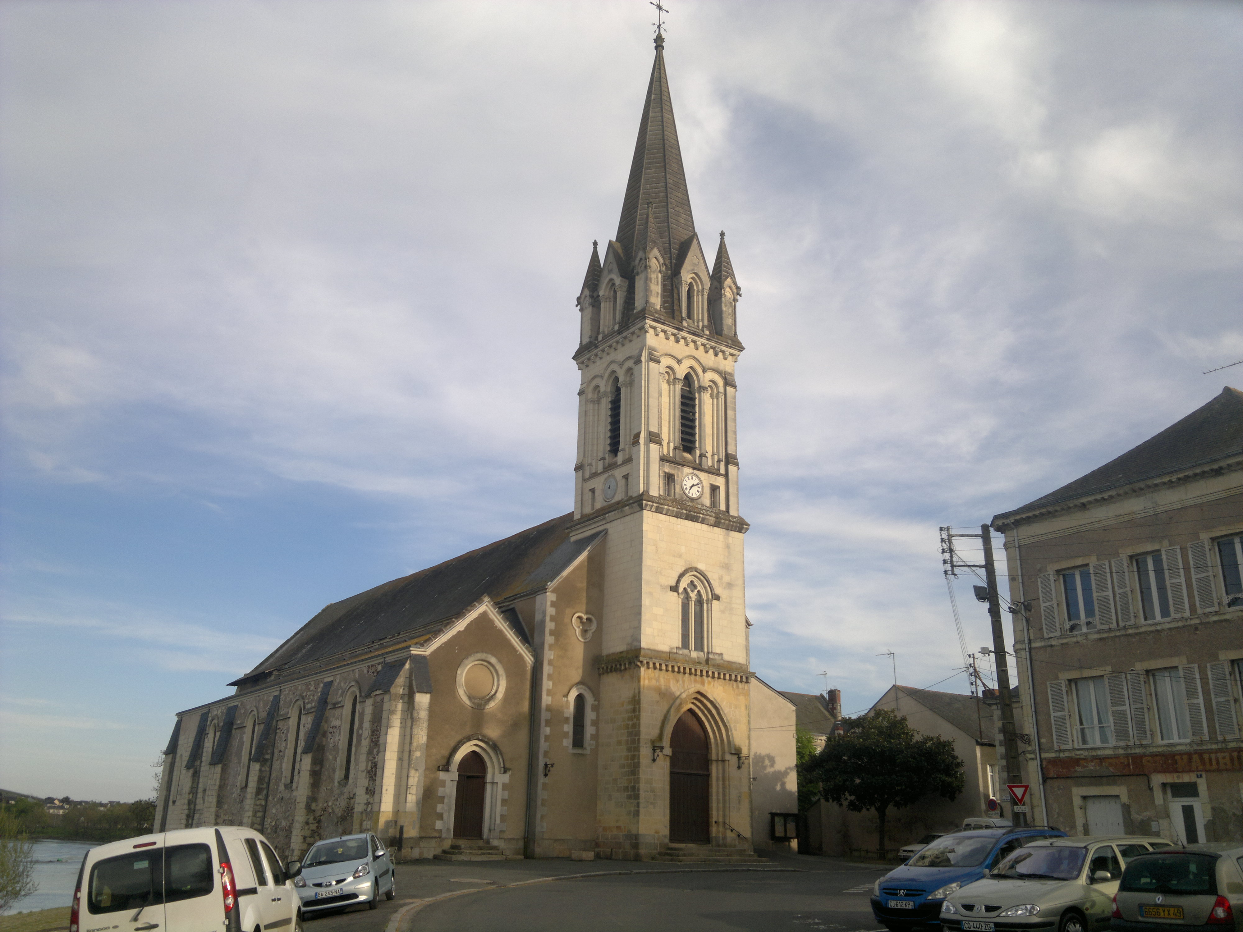 Église Saint-Maurille, Fr-49-Chalonnes-sur-Loire.